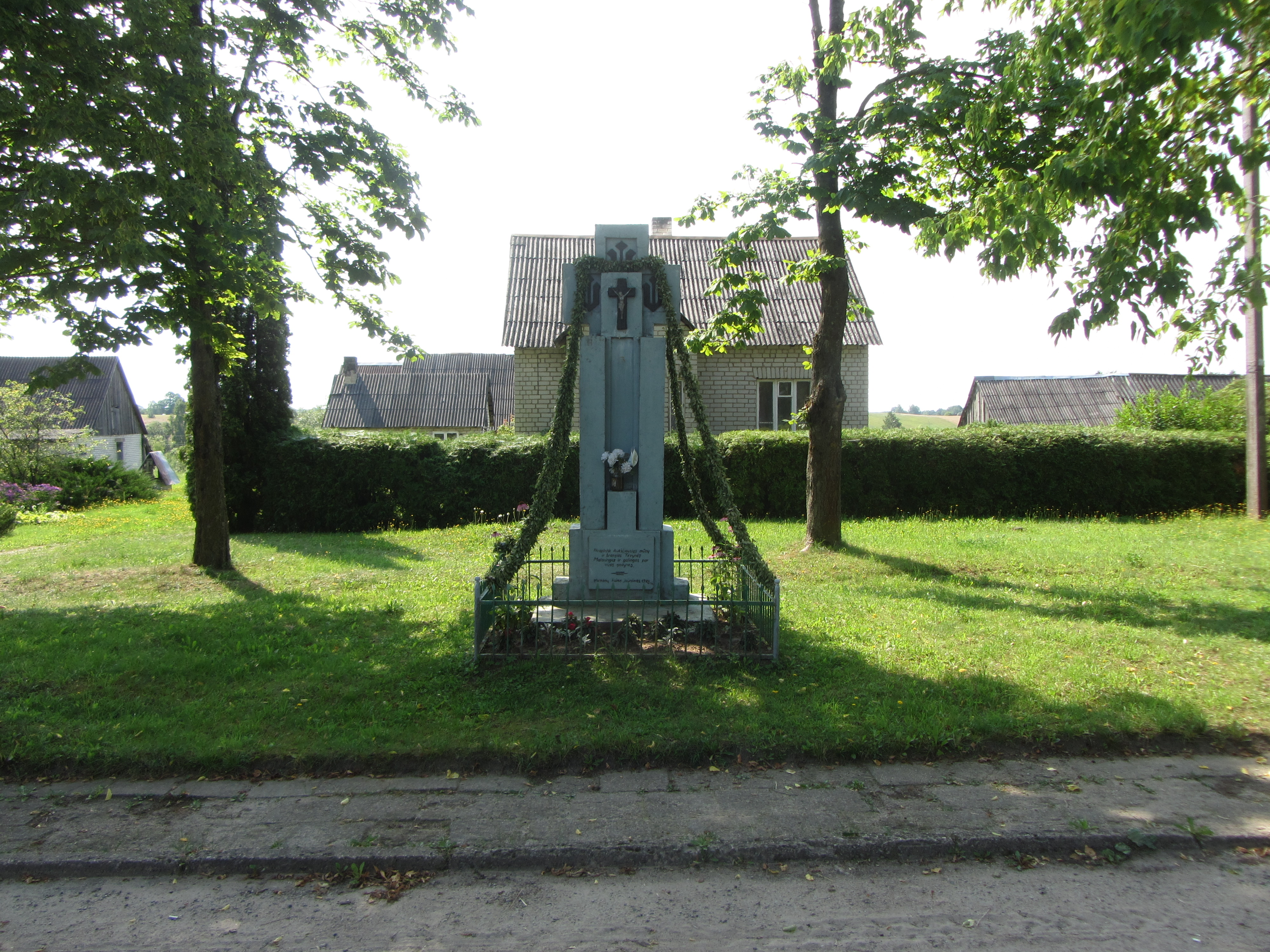 Varnėnai 67286, Lithuania